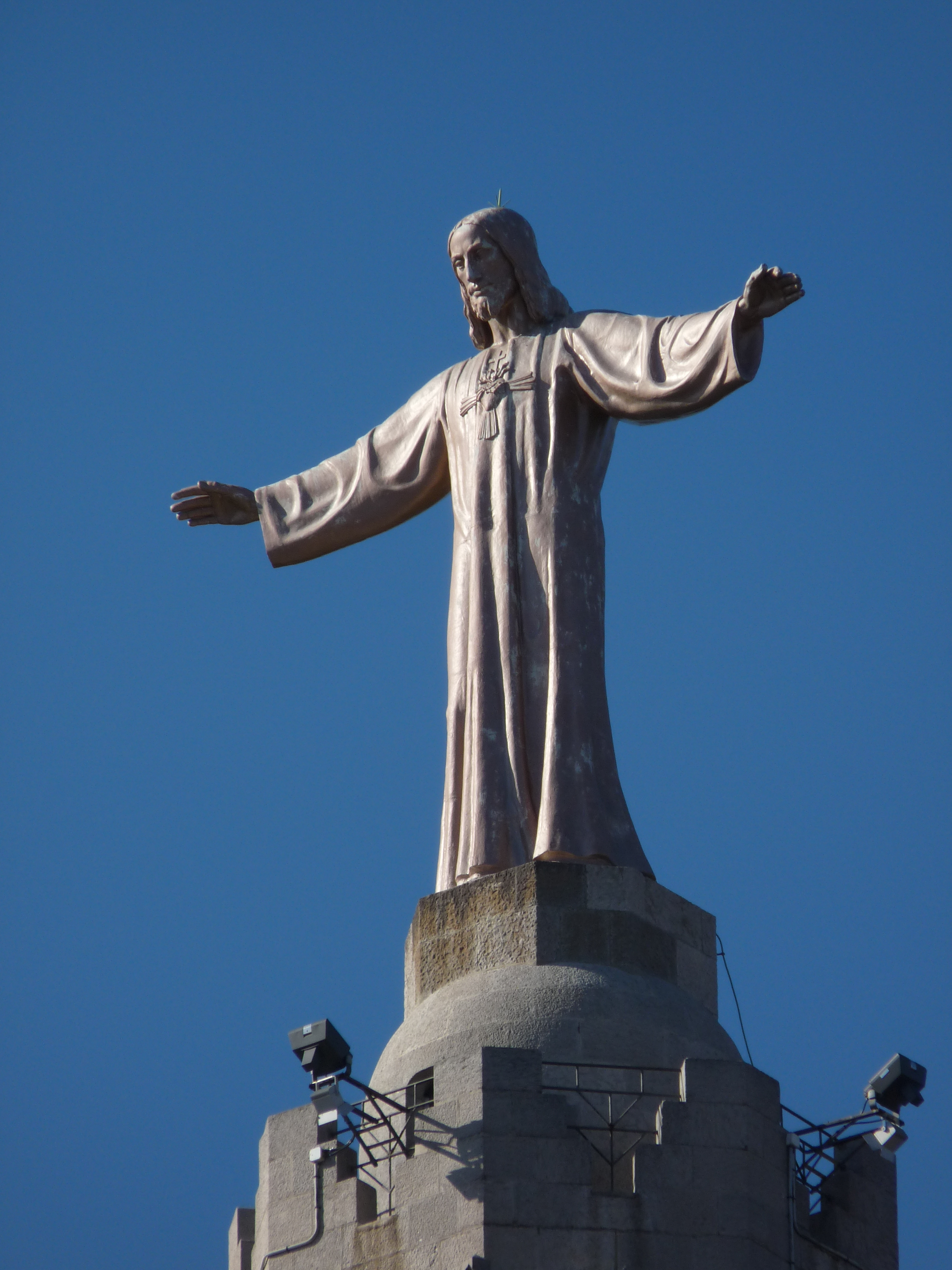 Se fundió en bronce en los talleres de Barberi de Olot (Gerona). Tiene 7 metros y medio de altura y pesa 4.800 kilogramos. Fue bendecida en la terraza delantera del Templo el 3 de diciembre por el doctor Modrego, obispo de Barcelona y fue subida el 10 de octubre de 1961, al cumplirse los 75 años de la donación de la cumbre a San Juan Bosco .